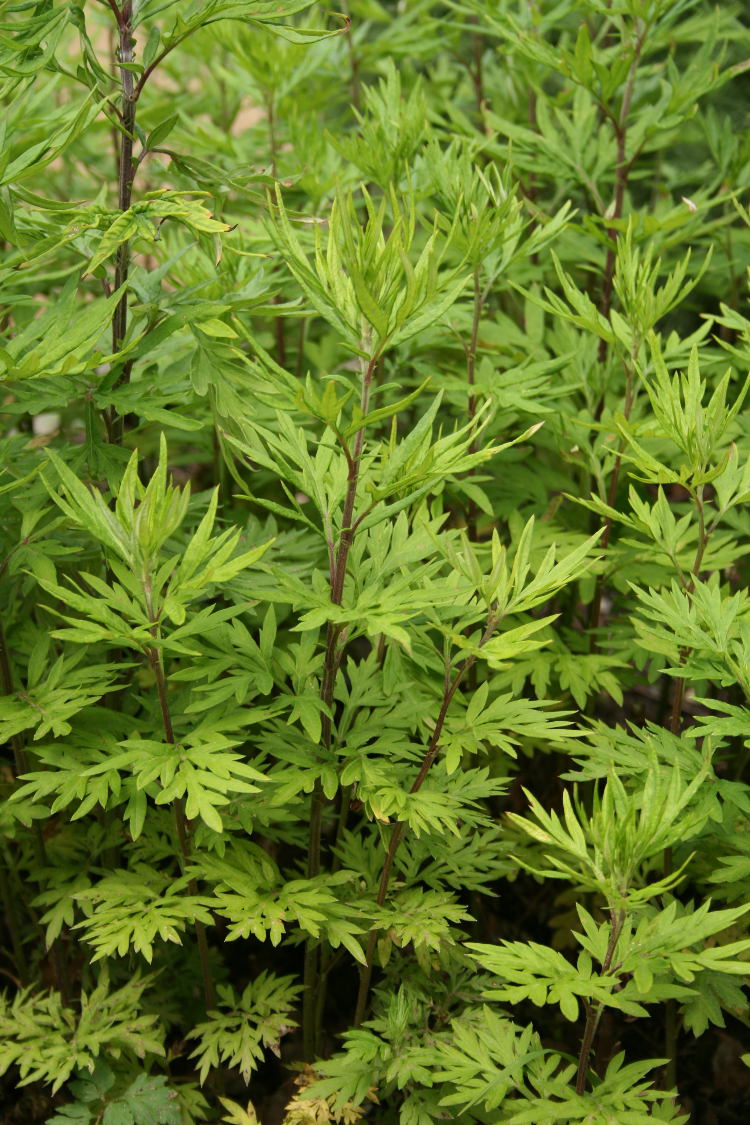 Asteraceae im Ober-Olmer Wald. Natalie Schmalz